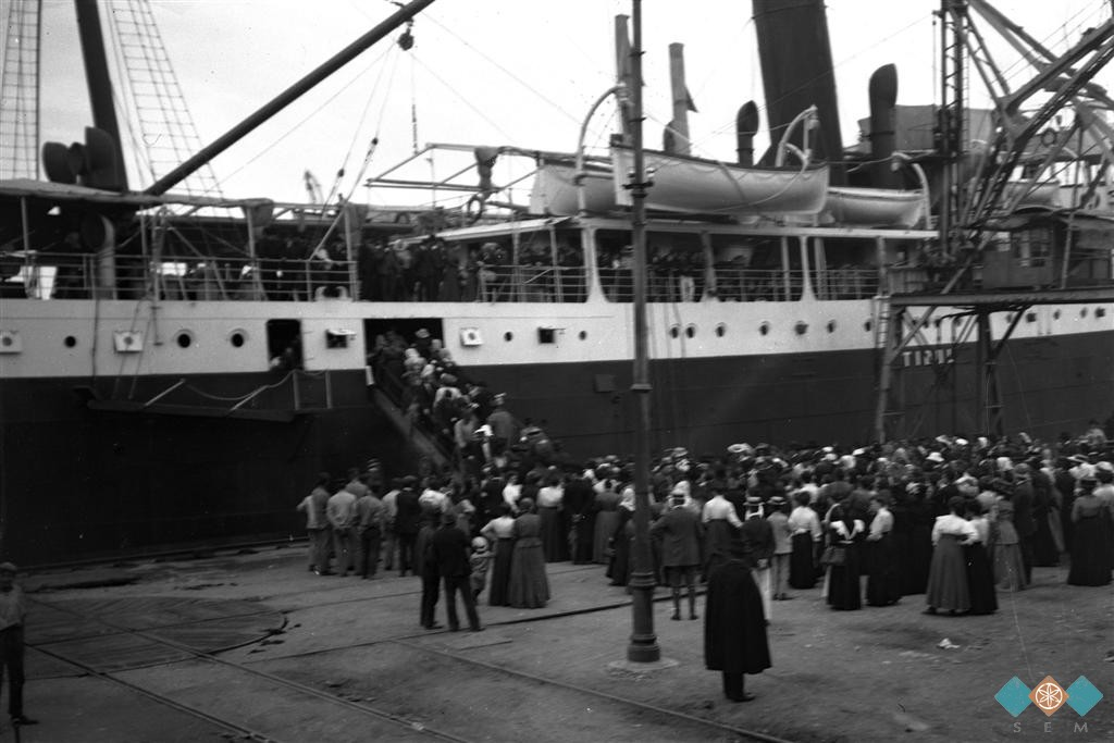 Romarji se v Trstu vkrcavajo na ladjo »Tirol«. Pred njimi je bilo pet dni plovbe do palestinskega pristanišča Jafa.